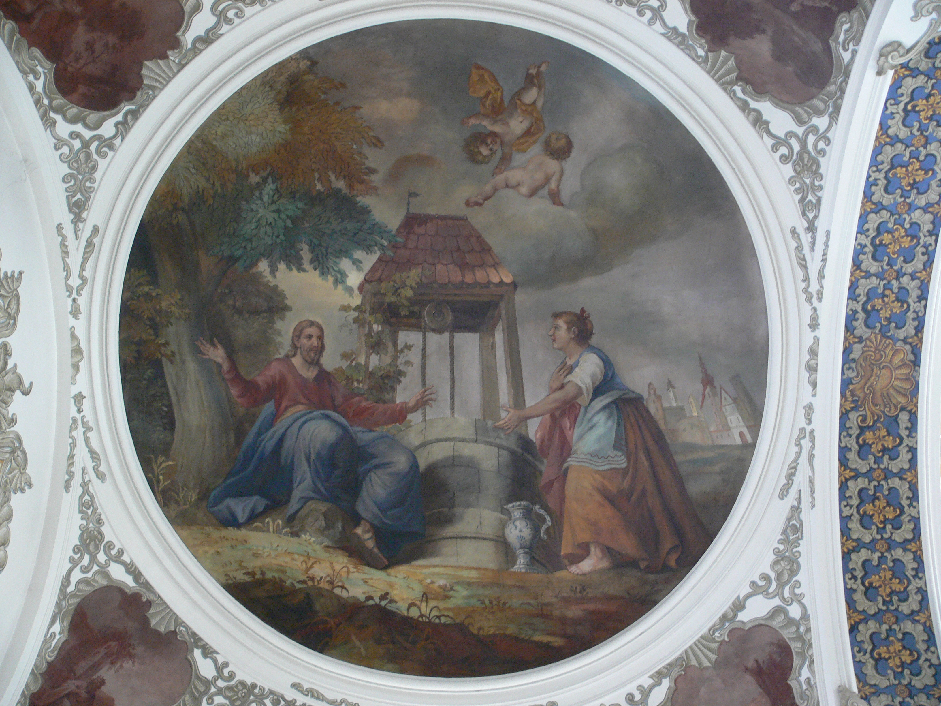 Stadtpfarrkirche St. Martin, Biberach an der Riss Johannes Zick: Seitenschiff, Deckenfresko: "Jesus und die Samariterin am Brunnen", 1746